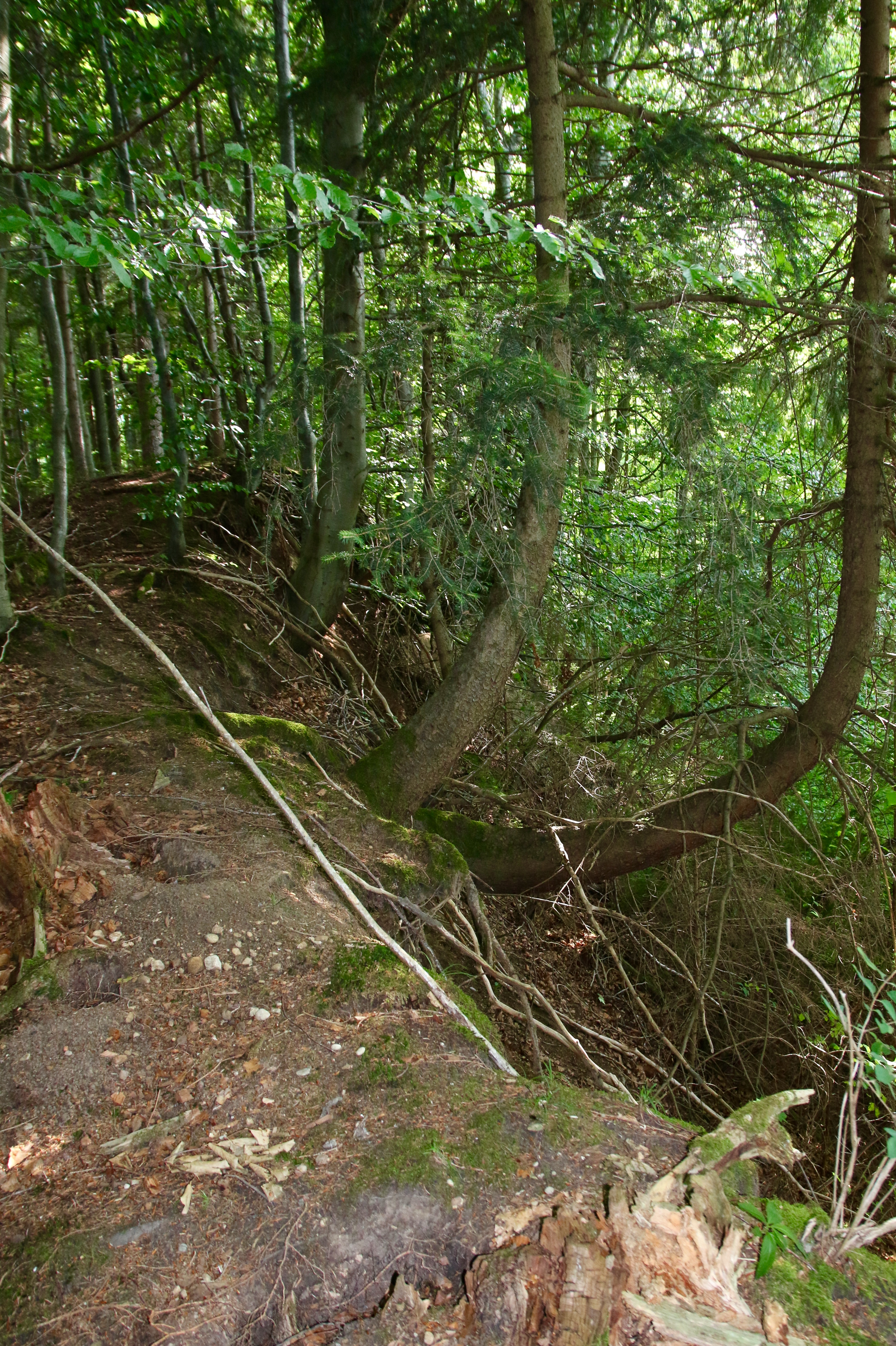 Der nordöstliche Abhang am Burgstalls.